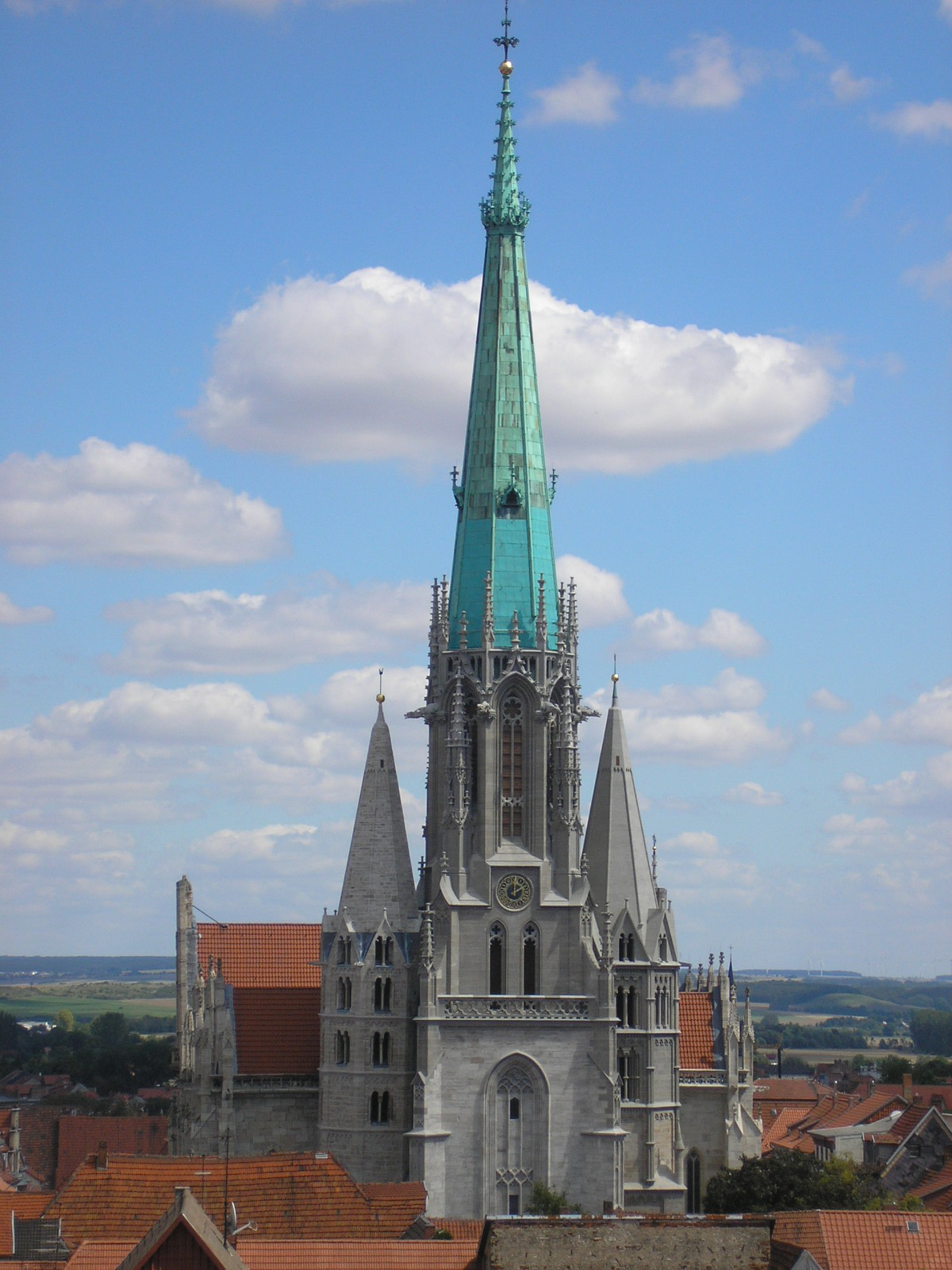 Blick vom Rabenturm auf die Marienkirche in Mühlhausen/Thüringen.